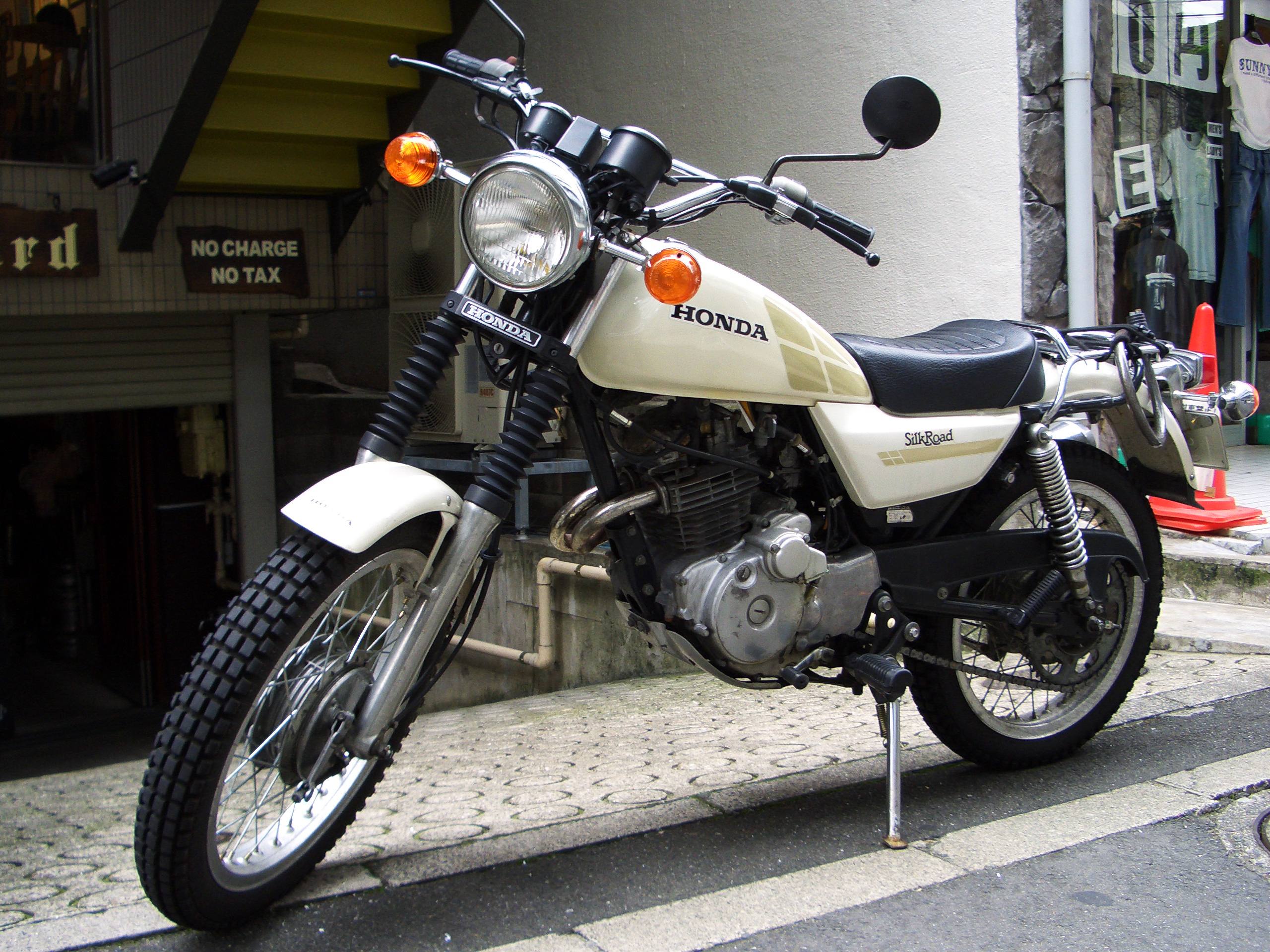 HONDAのバイクの中で、このTL125やイーハトーブとその兄貴分的な雰囲気を持つシルクロードはどこか牧歌的な雰囲気があってダイスキです。いまだにこんな良好なコンディションを保った状態の車輌があるのにも驚きなのですが。ところでこの初期型SL250系のエンジンってシリンダヘッドのカバー部分にガスケットorパッキンがないんですよね。ハズレのエンジンだと、オイル漏れの嵐。そんなエンジンだとジブンでガスケットを作ろうが、対油シートでパッキンを拵えようがオイル漏れは止まりません。ズボンが汚れるのを覚悟で乗るしかないのデス。アタシは同系列エンジンを載せたRS-Zに乗っていましたが、見事にハズレのエンジンでしたヨ。（EQUIP.: CASIO EX-Z57）